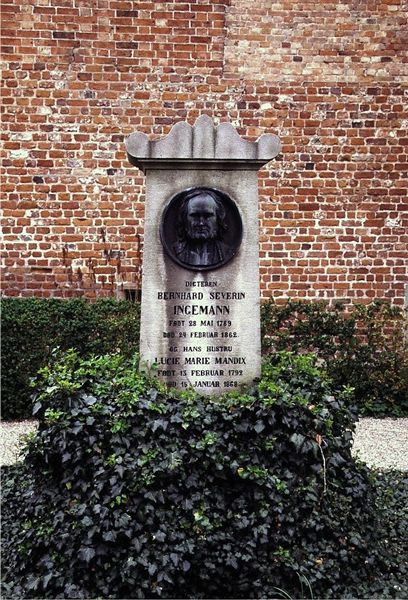 Sorø Klosterkirke